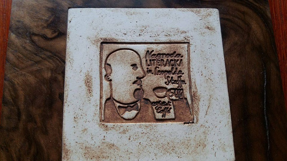 Plakieta autorstwa Sebastiana Kudasa i Joanny Rusinek